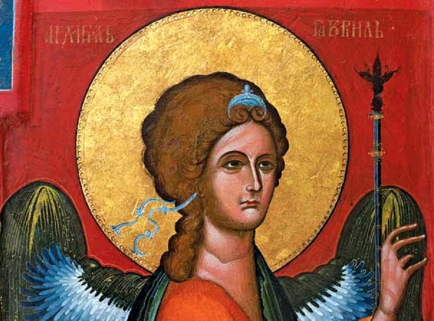 рхангел Гаврил... Детал од царските двери од црквата свети Никола во село Зрзе